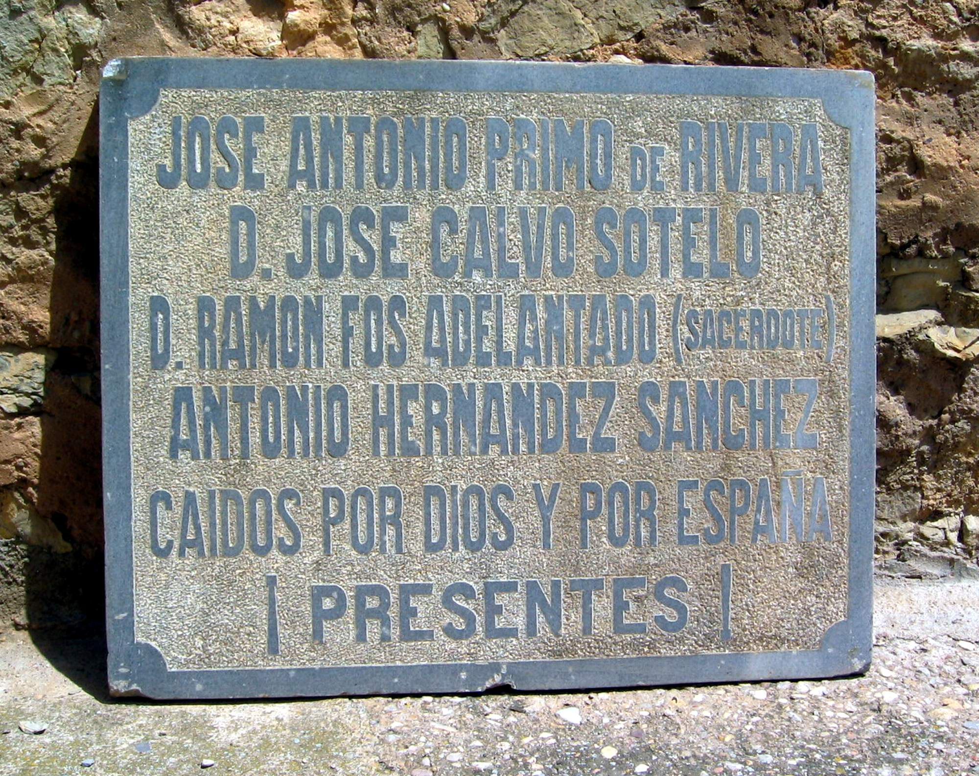 Detalle de placa que hubo en la fachada de la parroquial de Casasbajas (Valencia), en la que se recoge el nombre de don Ramón Fos Adelantado, sacerdote asesinado en 1936.